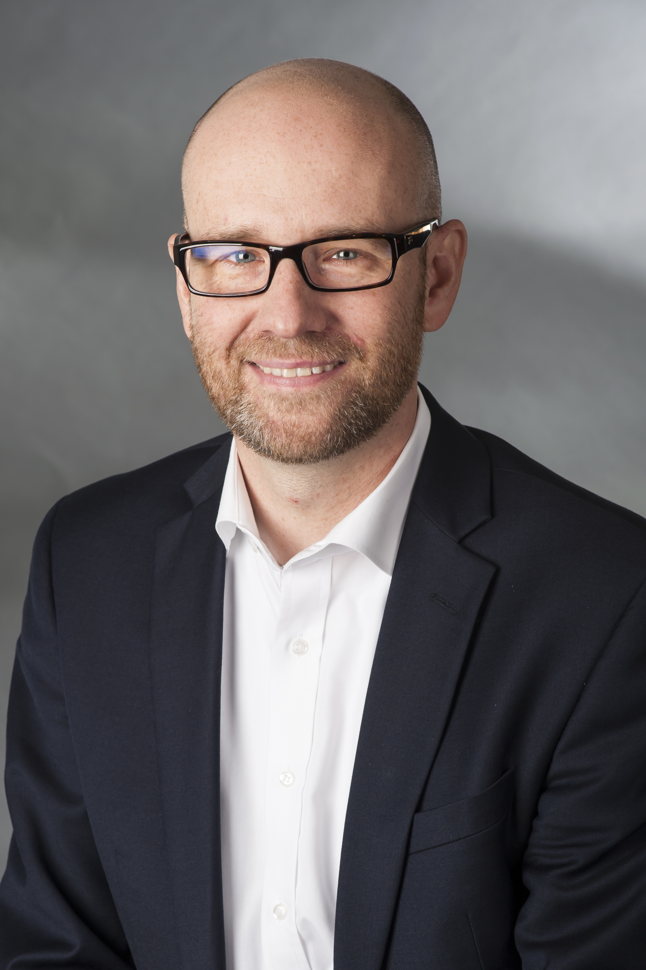 Porträt von Peter Tauber, Generalsekretär der CDU